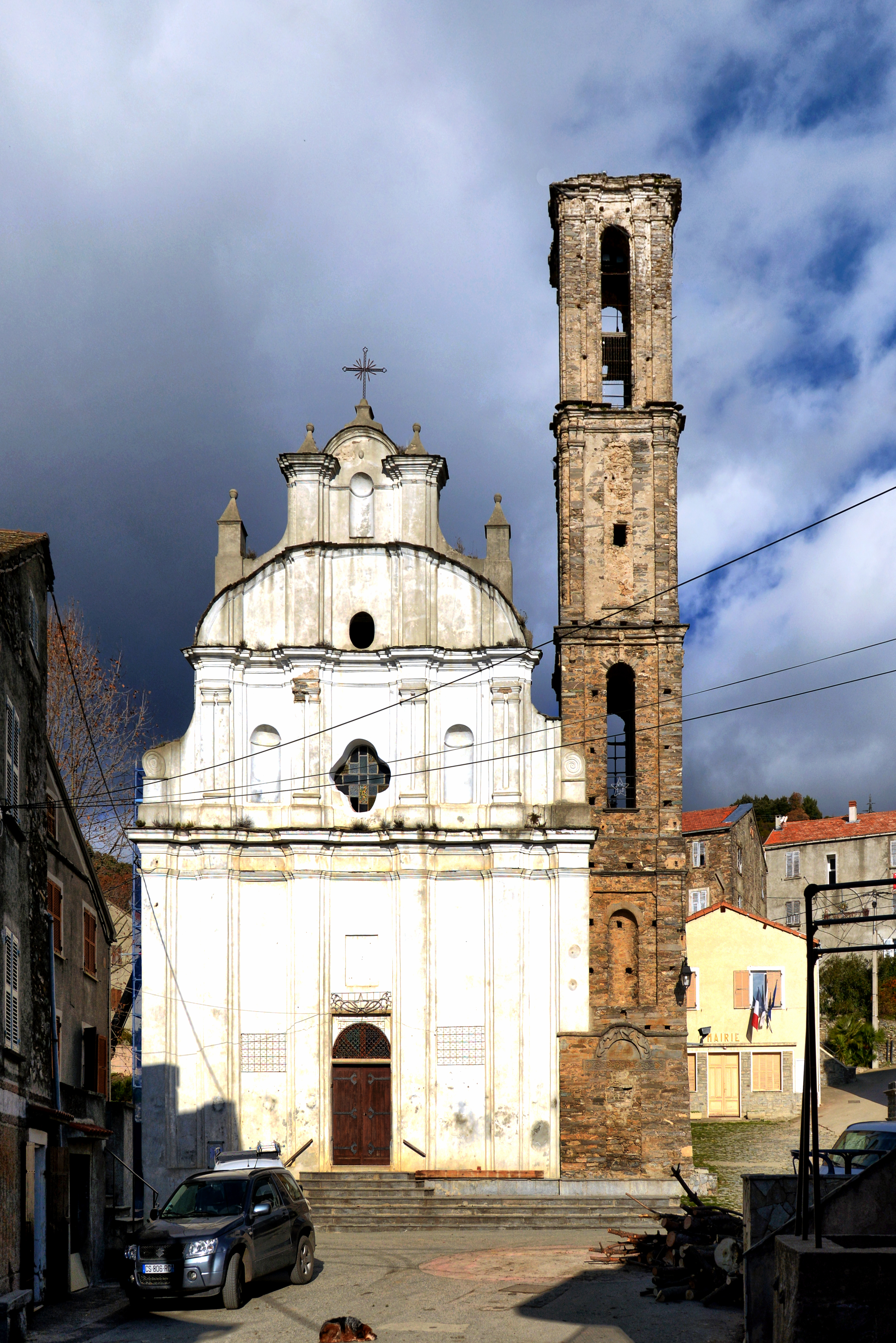 Piedicorte-di-Gaggio, Rogna (Corse) - Église Notre-Dame de l'Assomption du XIXe siècle. Le clocher dans lequel est incorporé un bas-relief provenant d'une ancienne église pisane, est classé Monument historique.